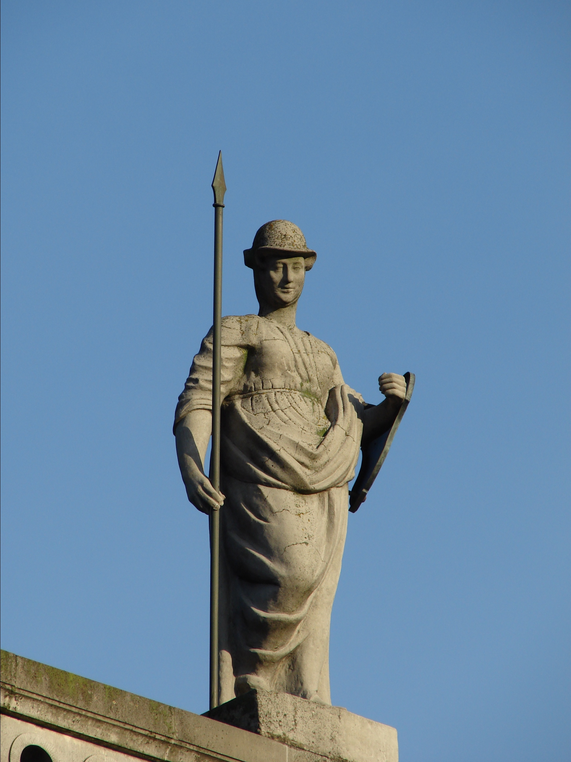 Skulptur fra Thotts Palæ, Kongens Nytorv, København